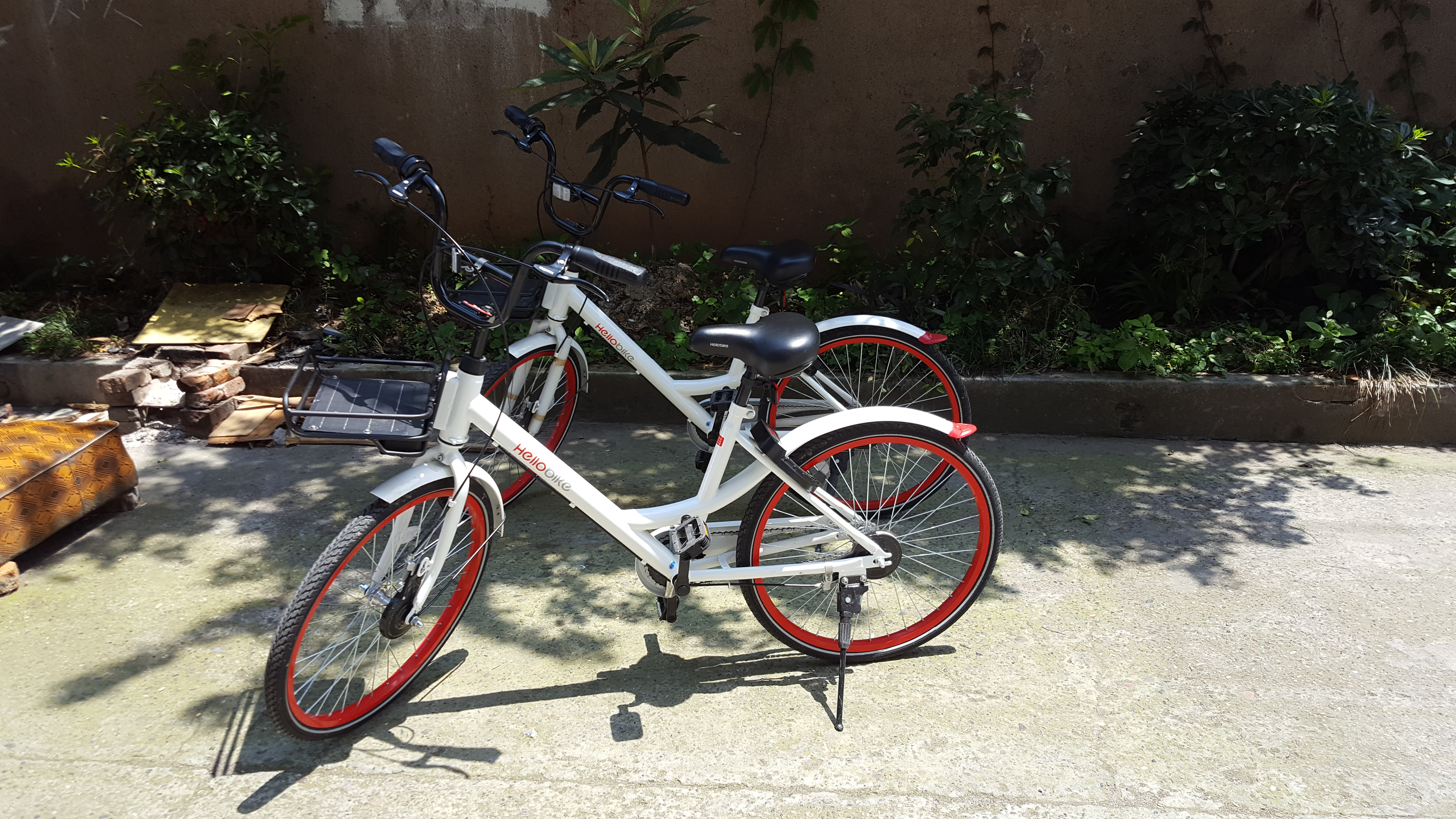 中国共享单车，hellobike（哈啰单车），宜昌，2017年5月29日